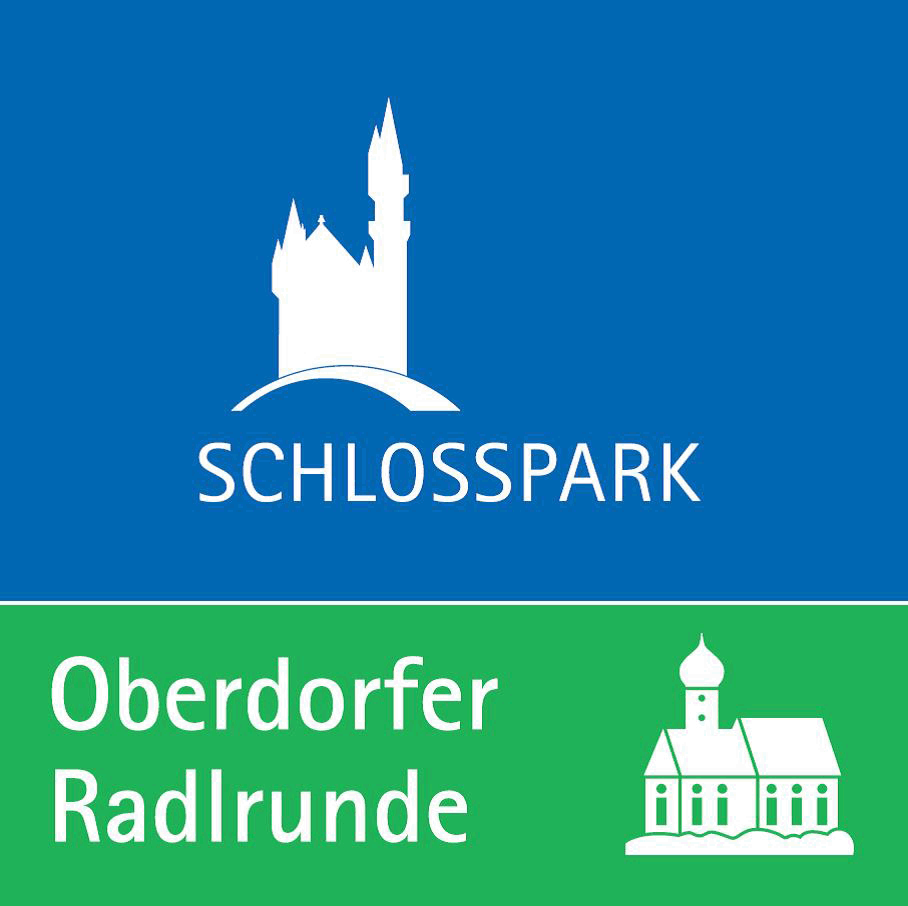 Logo Oberdorfer Radlrunde